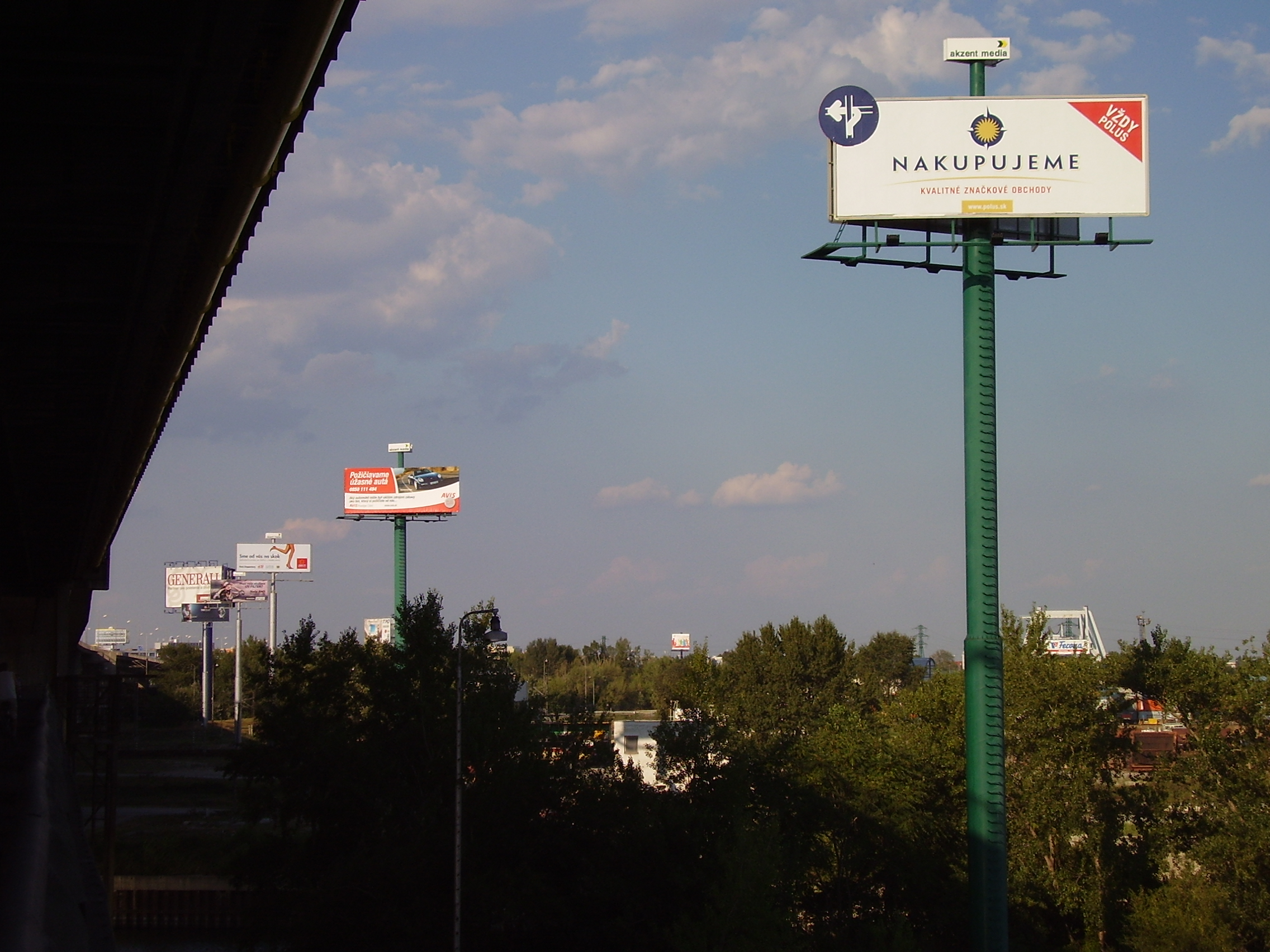 Bratislava